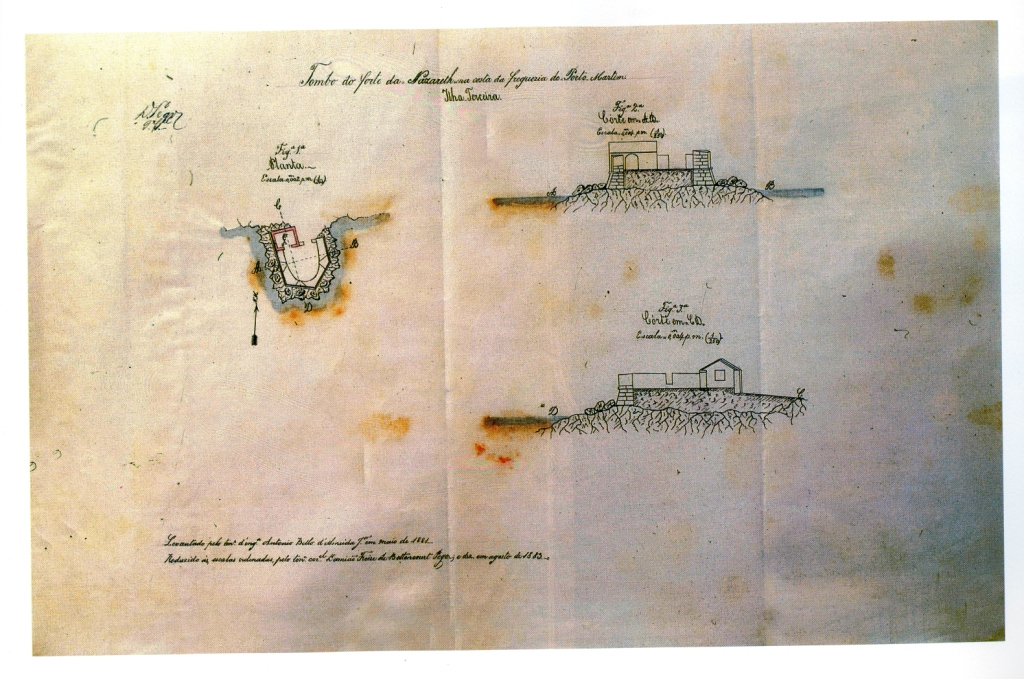 "Tombo do forte da Nazareth, na costa da freguezia do Porto Martim", Ilha Terceira (Açores), Portugal.